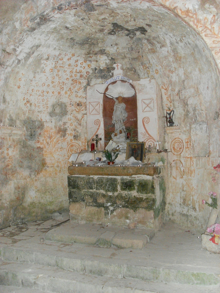 Abside de la chapelle Saint-Michel de Monieux